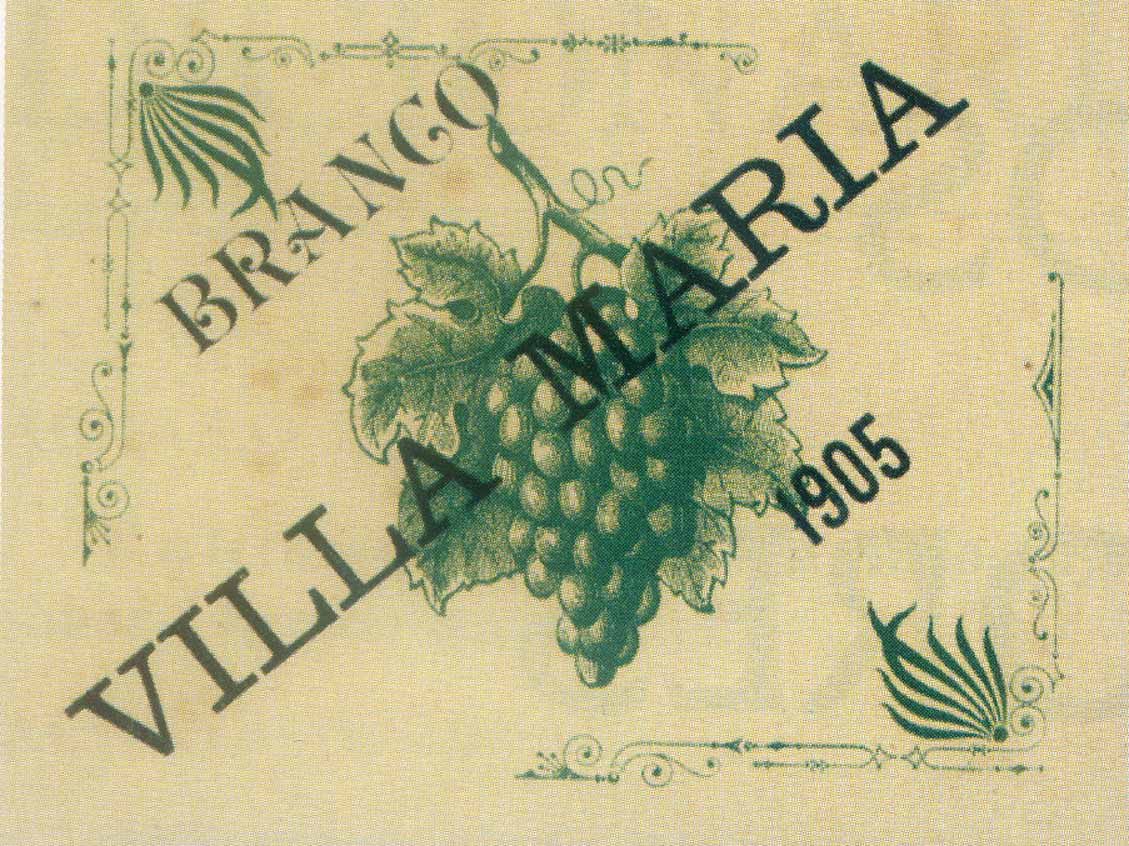 Rotulo de vinho Casteletes, Villa Maria, 1905, AÃ§ores, Portugal.